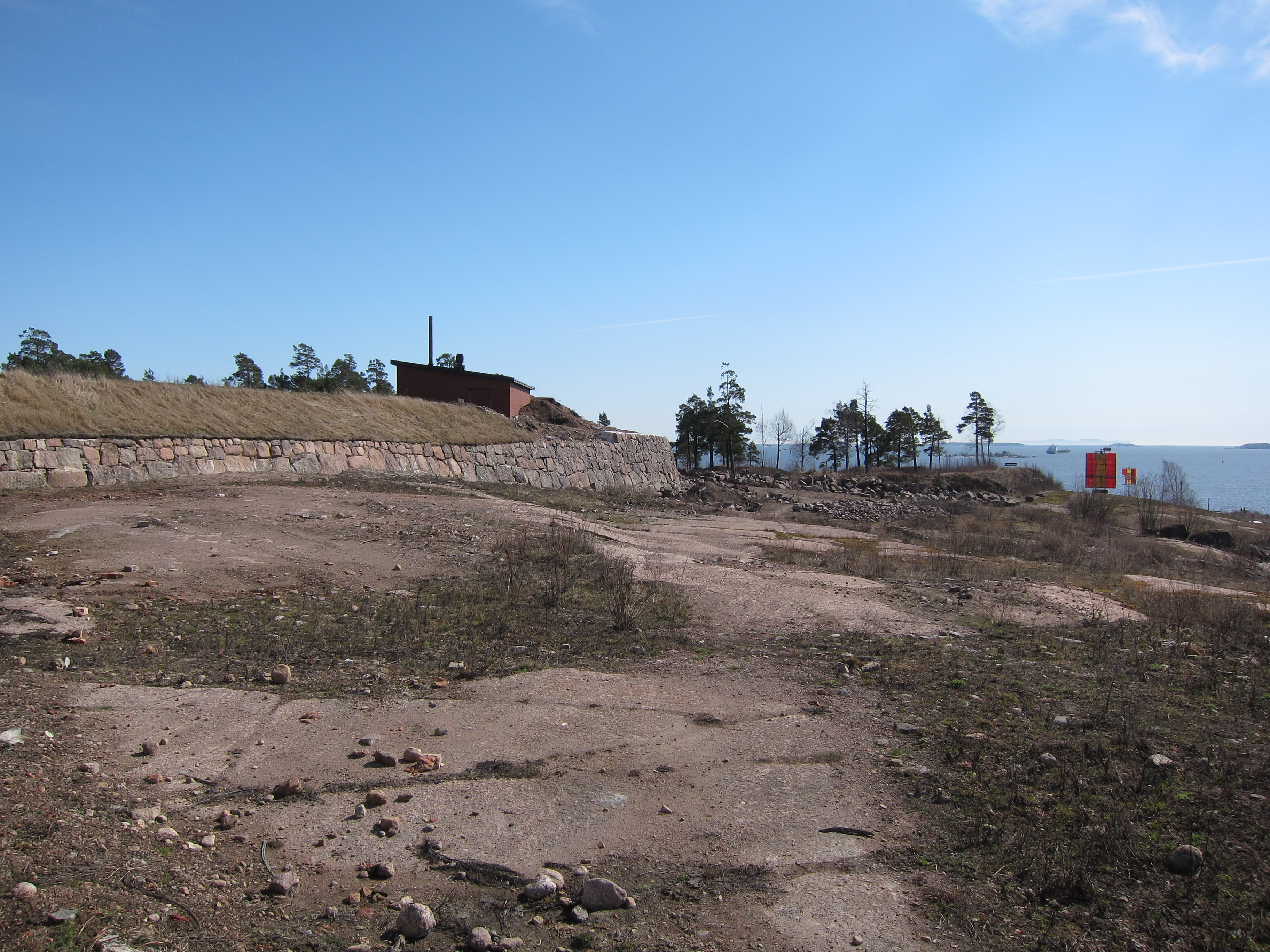 Ruotsinsalmen merilinnoituksen Fort Katarinan entisöityä muuria ja raunioita Kotkassa Katariinan kaupunginosassa.